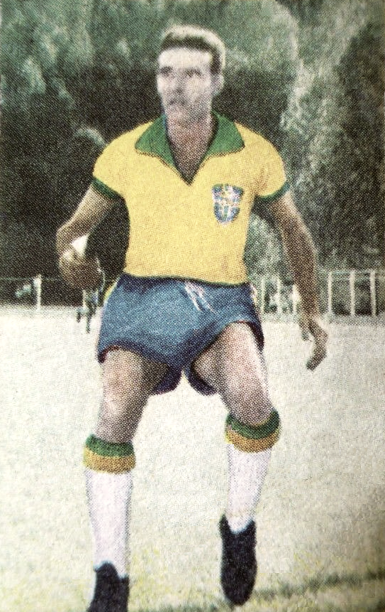 Mário Zagallo en 1962 - CALCIATORIO IN CAMPO, Collezione Lampo 1964, n°206 (Astra édizioni, Milano, chiusura 1986).